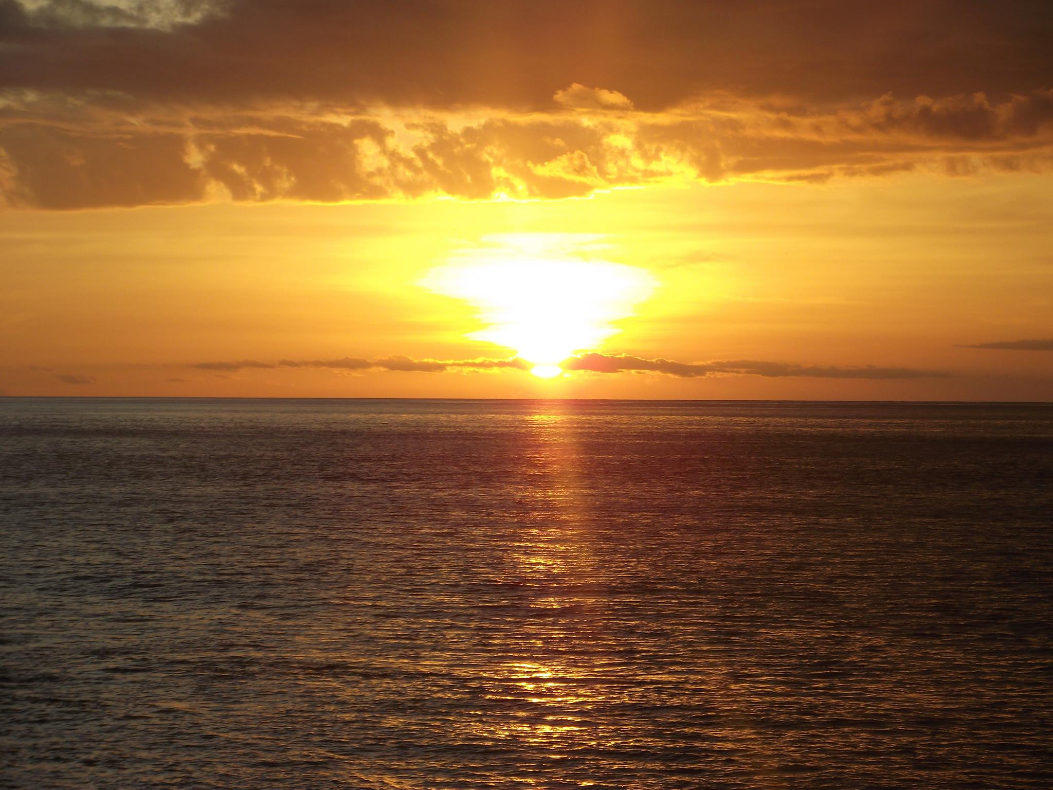 Sonnenuntergang in Oecusse